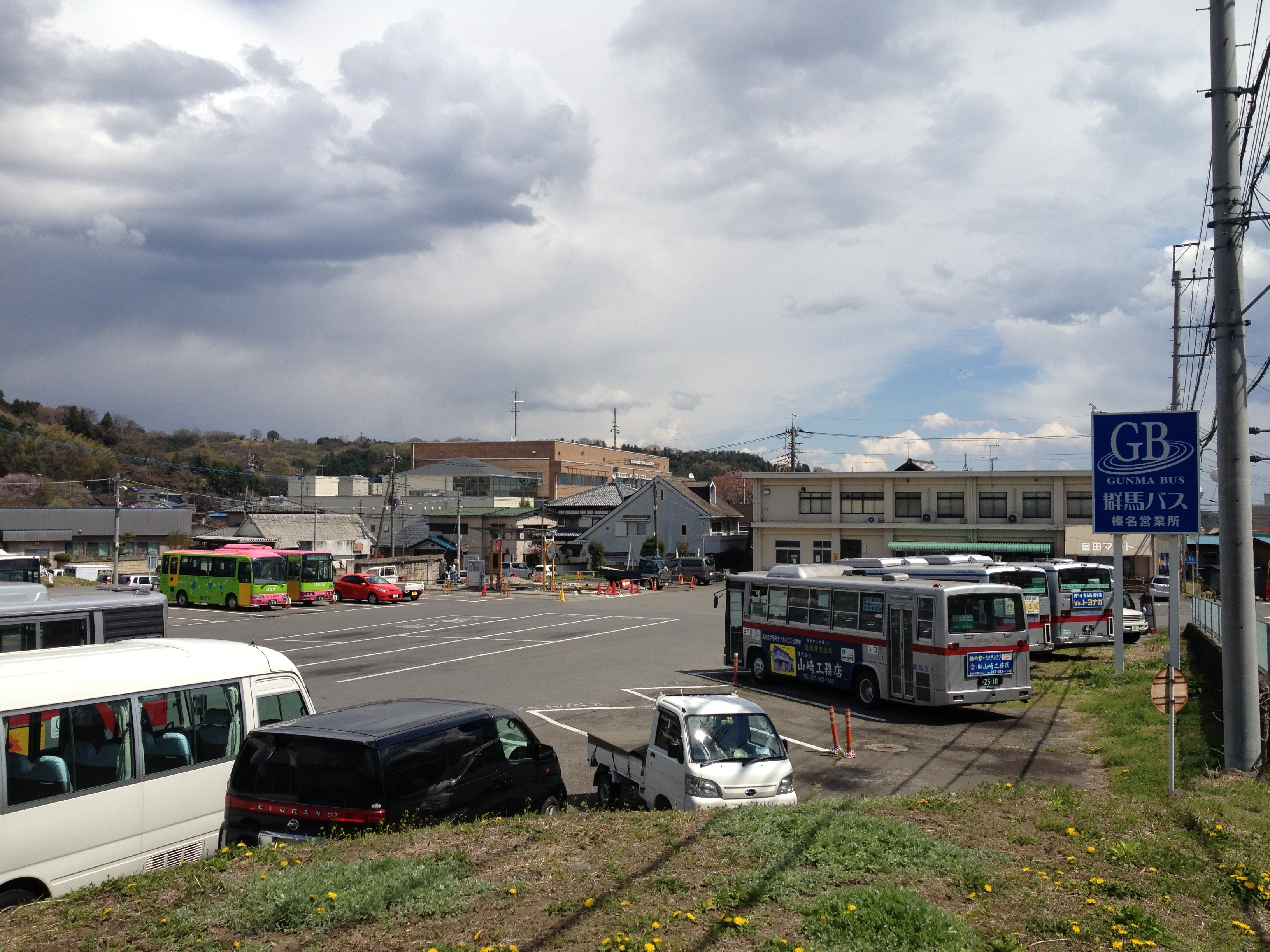 群馬バス榛名営業所。営業所全景。